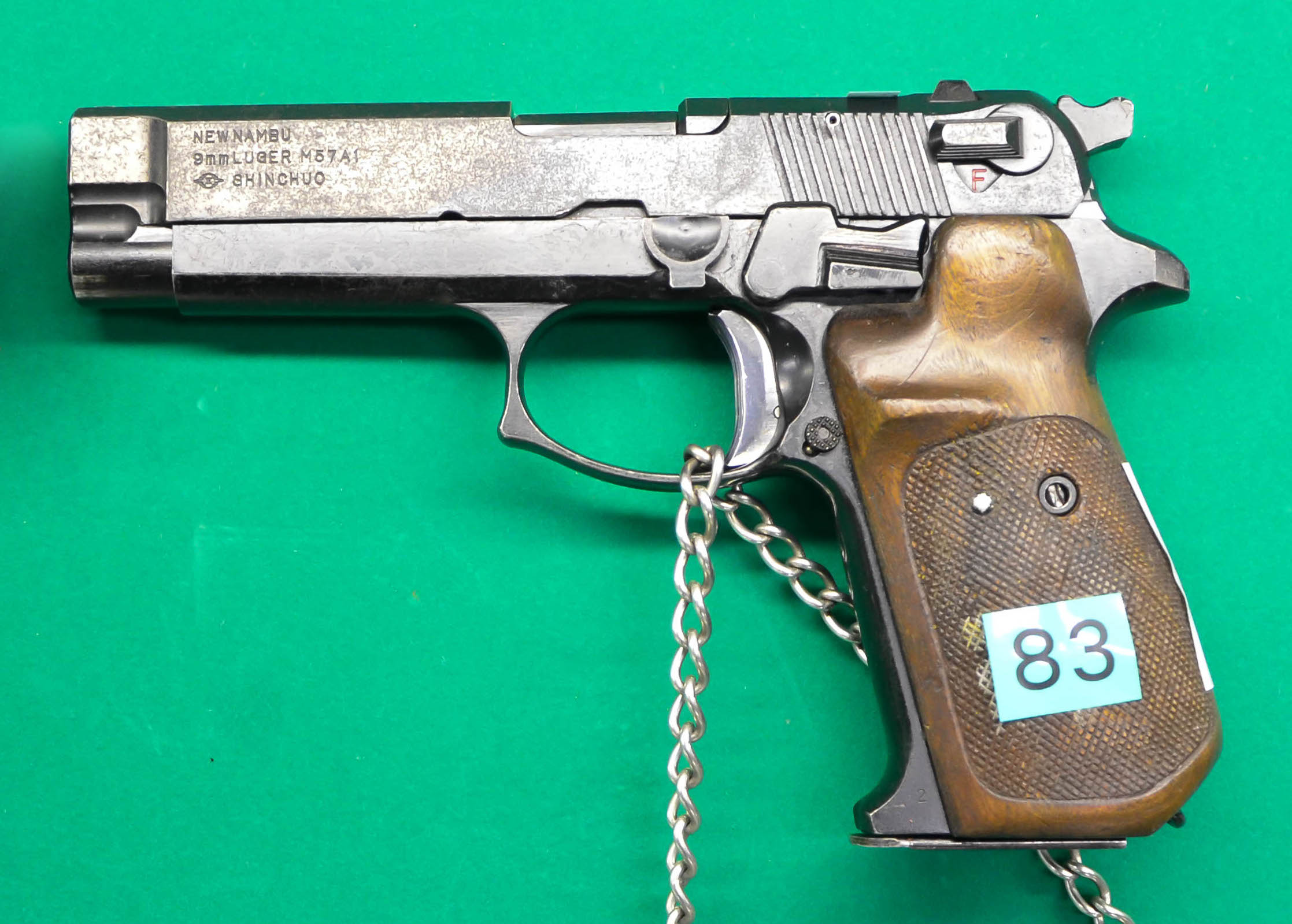 自衛隊の次期拳銃として新中央工業（ミネベア）が開発したM57A1拳銃。トライアルの結果、SIG SAUER P220が9mm拳銃として採用が決まり、本銃が配備される事はなかった。 自衛隊武器学校の展示品を撮影。